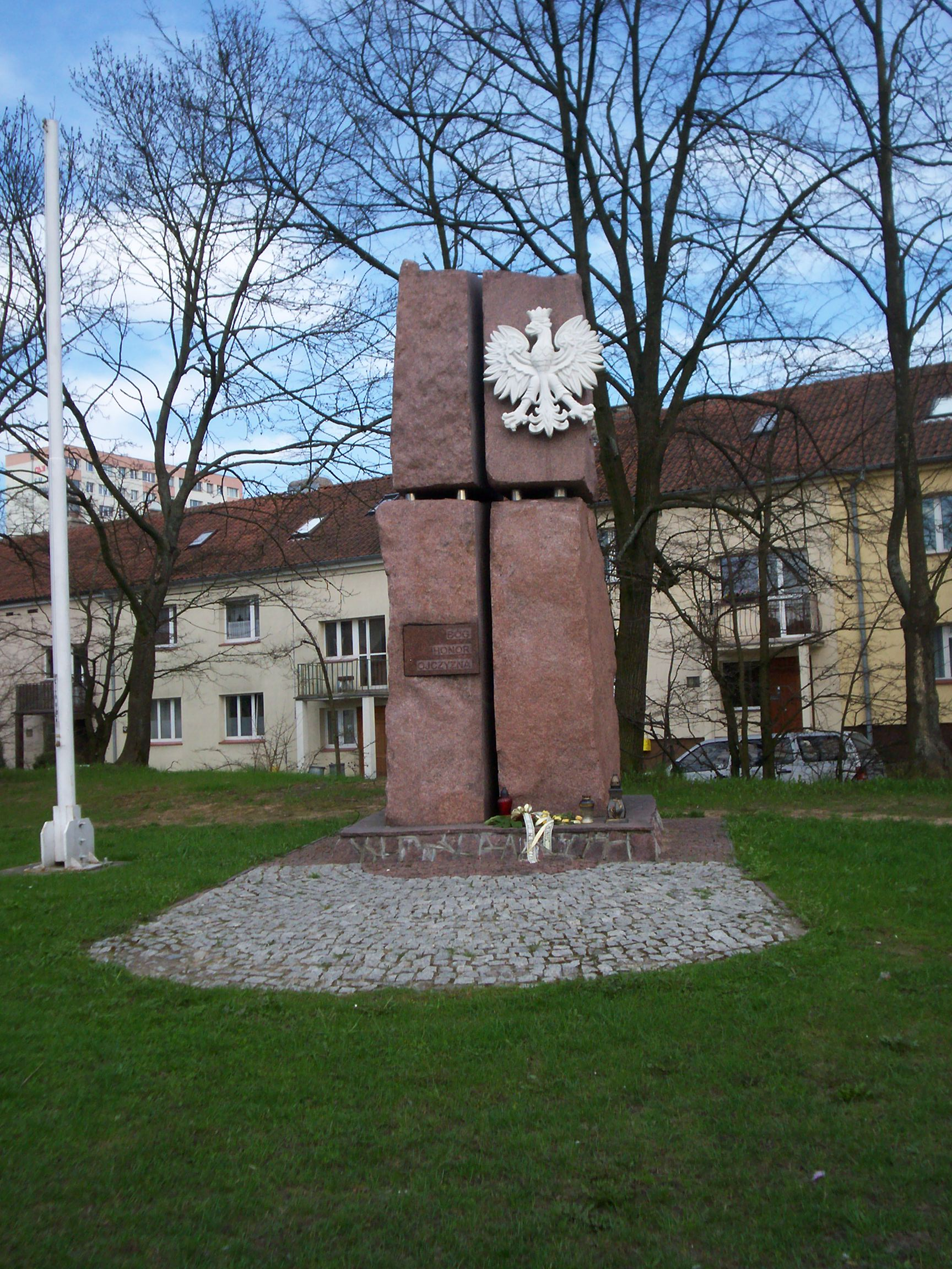 Kamień pamiątkowy poświęcony NSZZ "Solidarności" w Olsztynie